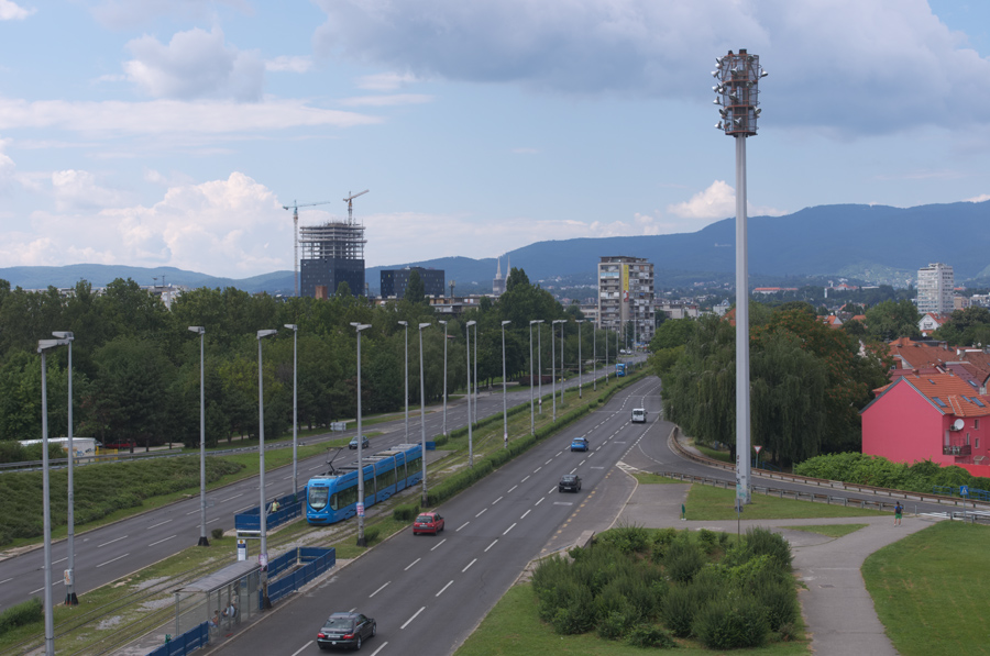 Pogled na neboder u izgradnji u sklopu Poslovnog centra Strojarska